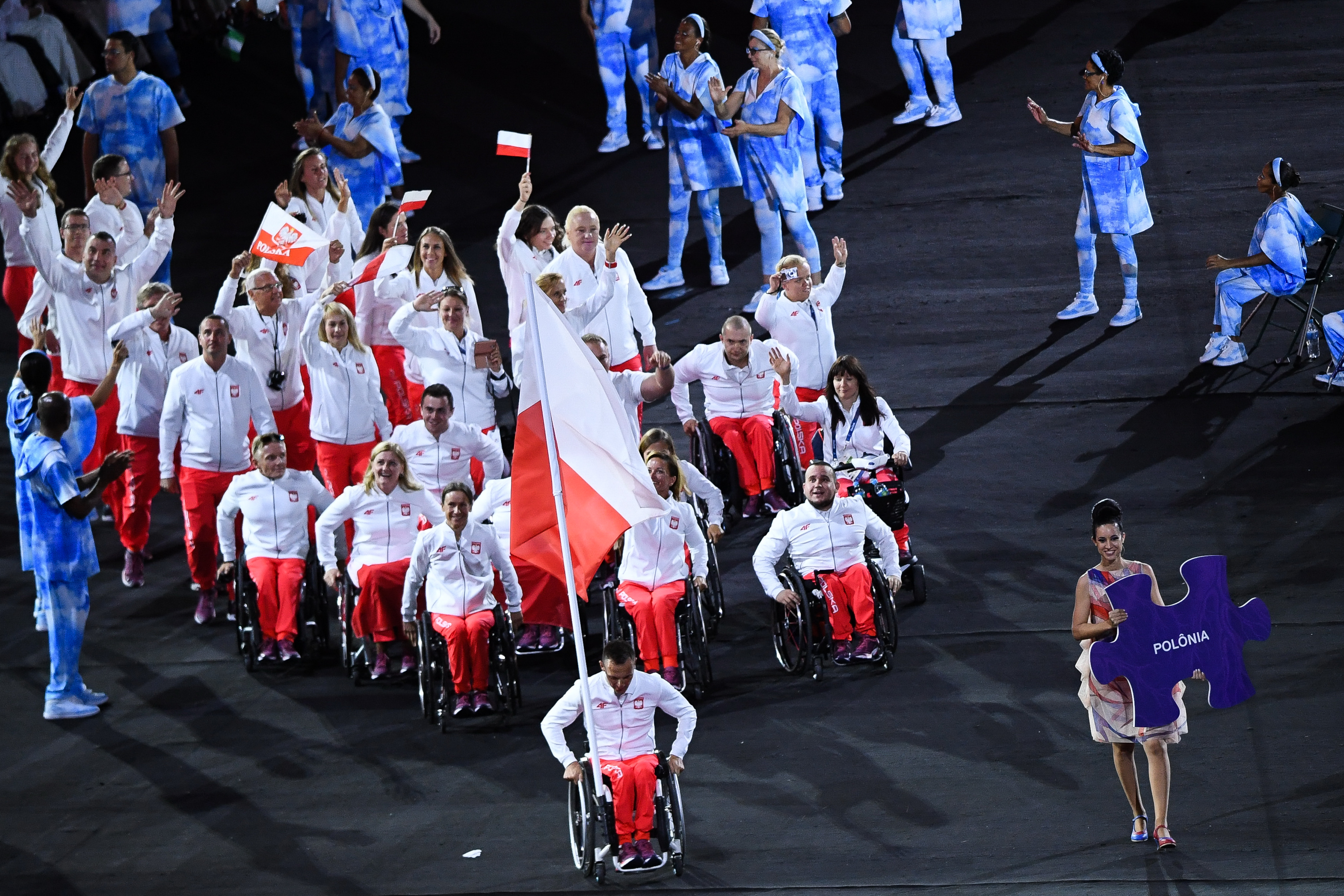 Rio de Janeiro - Cerimônia de abertura dos Jogos Paralmpicos Rio 2016 no Estdio do Maracanã (Tomaz Silva/Agência Brasil)